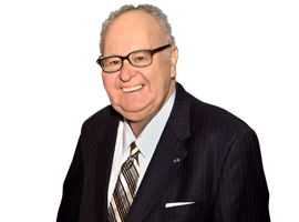 Arnoldo Hax